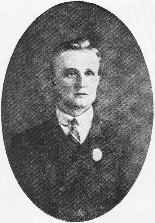 Леандер Рейо, общественный деятель Эстонской Ингерманландии